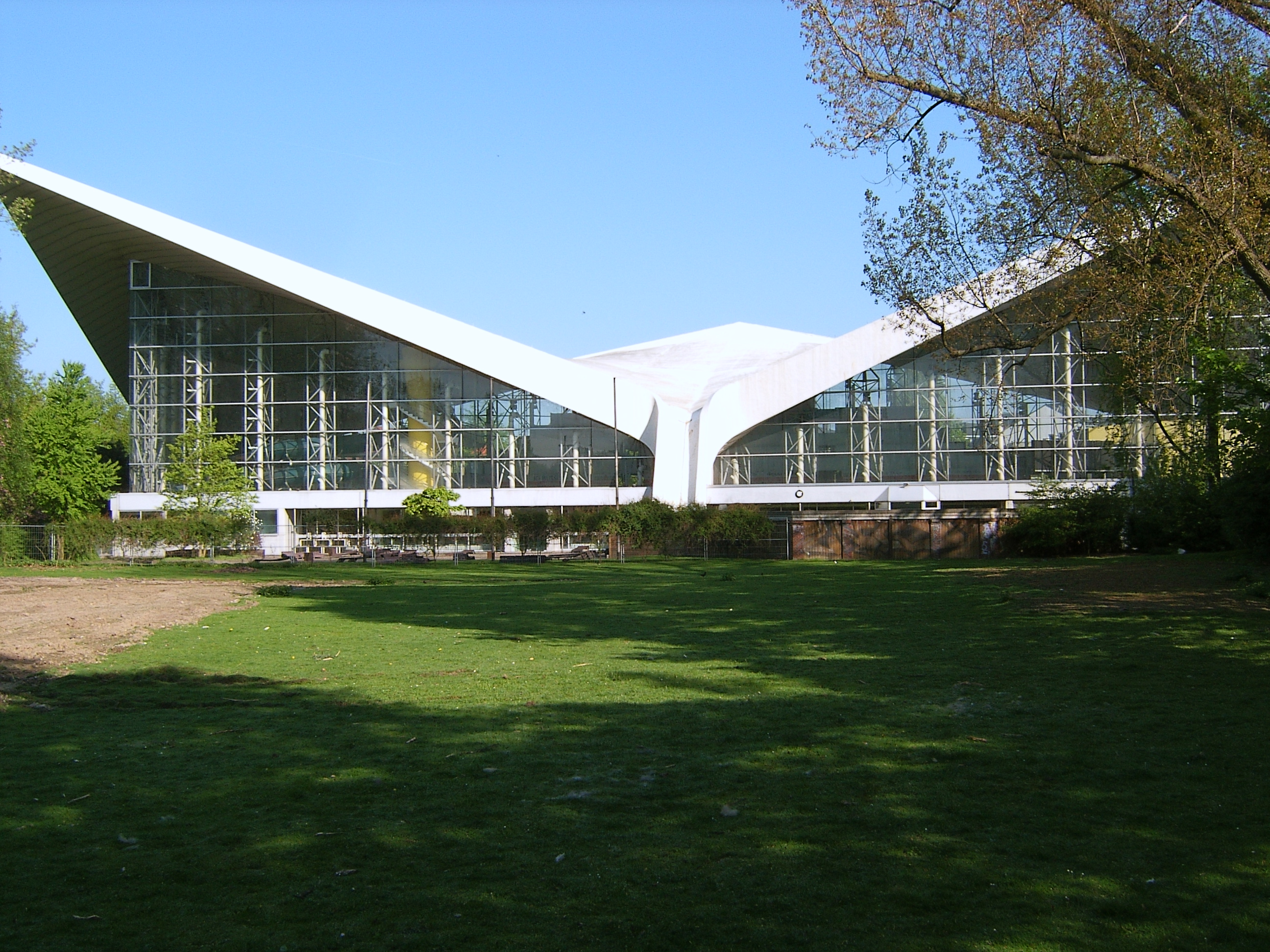 Die Alsterschwimmhalle (auch Schwimmoper genannt) in Hamburg-Hohenfelde.